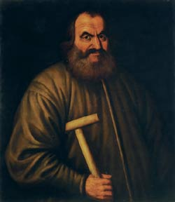 Портрет Н.Ф.Нарышкина ("патриарх Милака"). N.F.Naryshkin "patriarch Milaka".